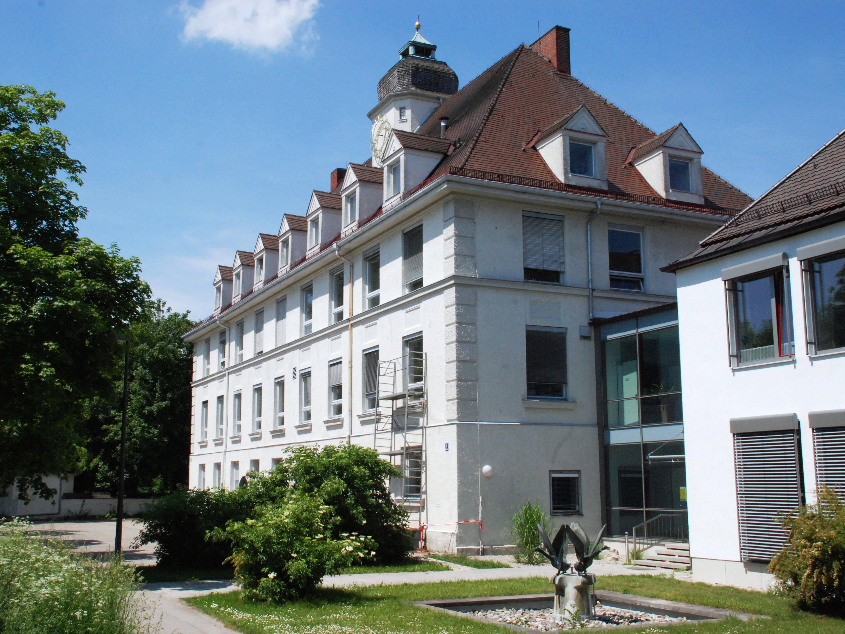 Denkmalgeschütztes Gebäude in Oberschleißheim, Veterinärstraße 2, Landkreis München: modern-barockisierende Anlage mit Ummauerung, Eckpavillon und Wärterhäuschen, um 1913/14, jetzt Dienststelle des Bayerischen Landesamts für Gesundheit und Lebensmittelsicherheit